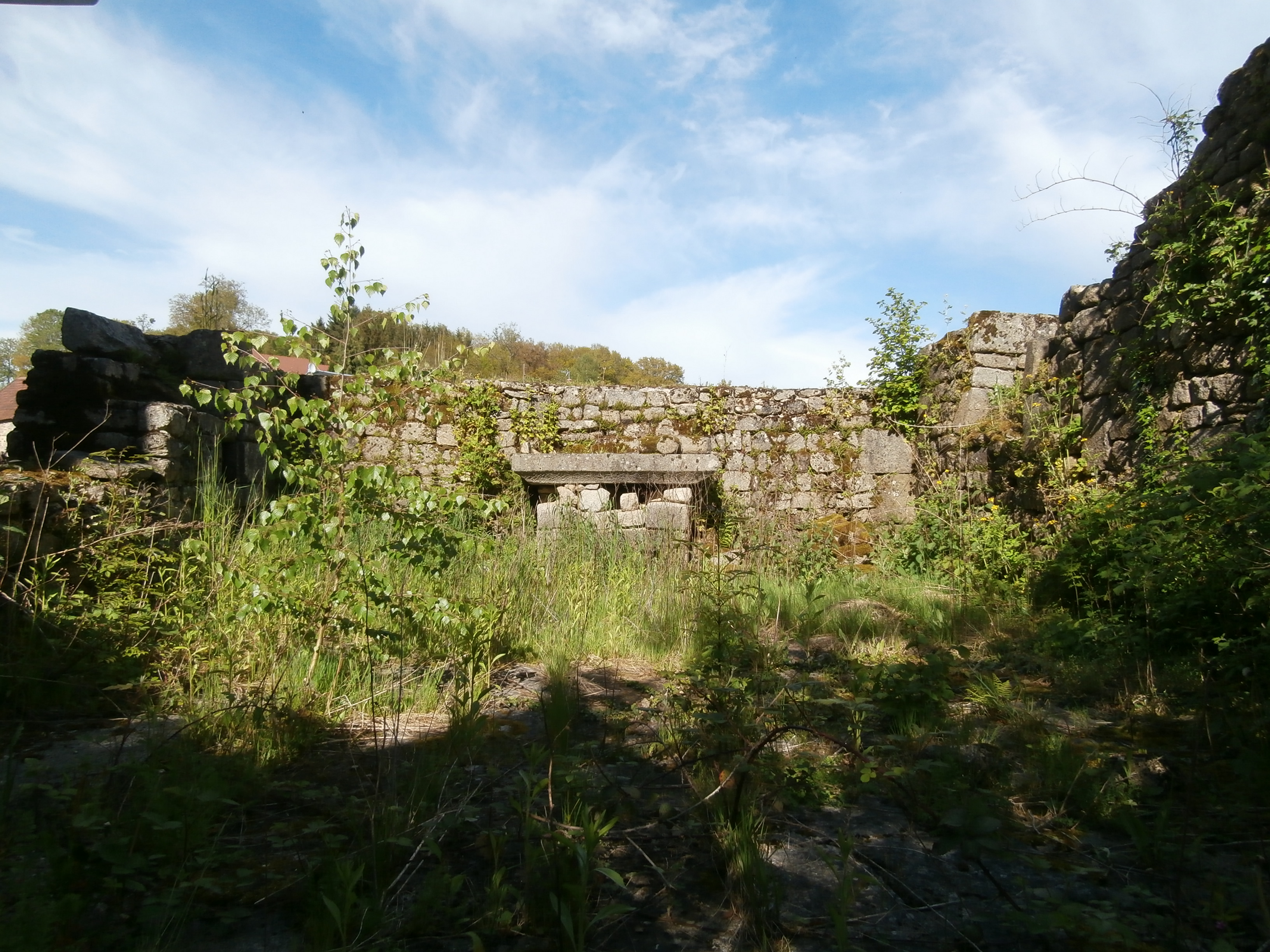 Eglise - ruine - vue sur l'autel